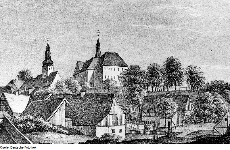 Original image description from the Deutsche Fotothek Triebischtal-Taubenheim. Ortsansicht